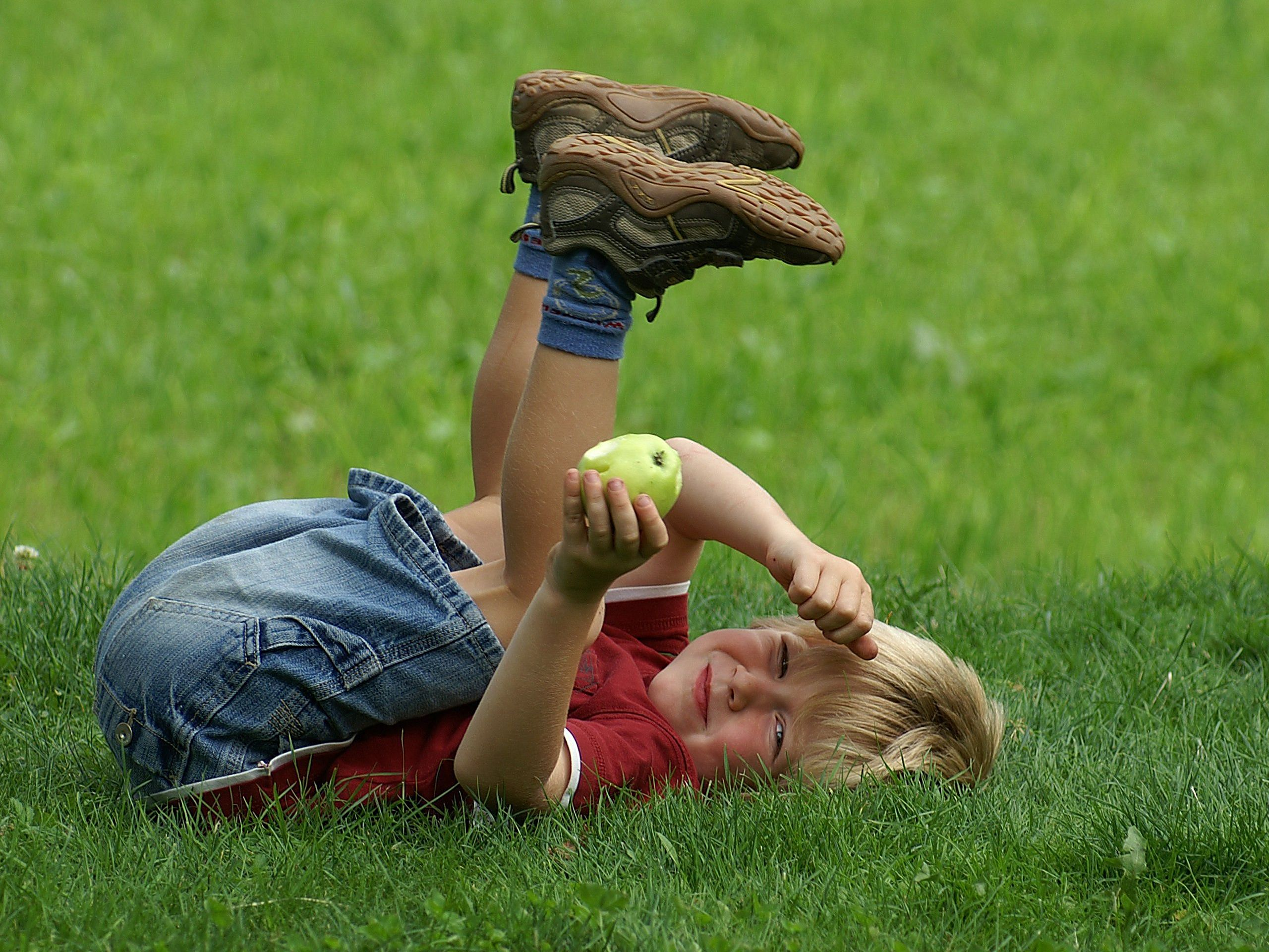 Kleinkind 3 Jahre verspeist einen Kulturapfel.